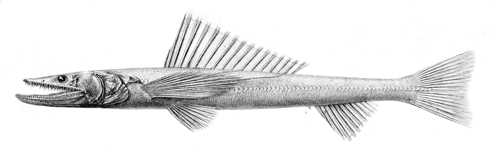 Bathysaurus ferox